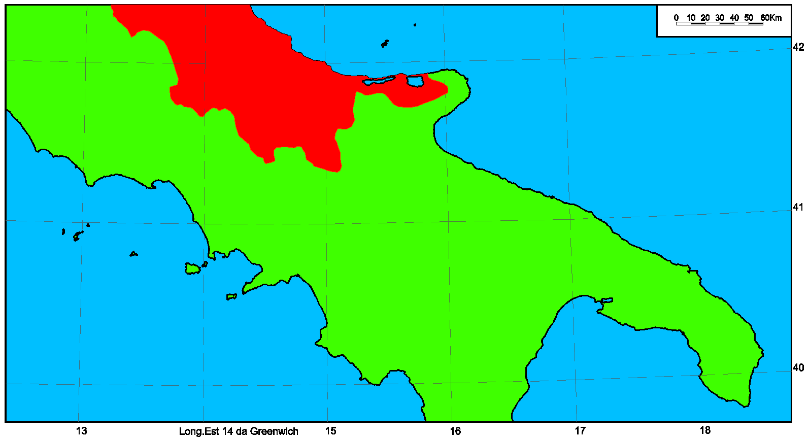 Il fiume Aufido della battaglia di Canne nel bacino idrografico del mare Adriatico